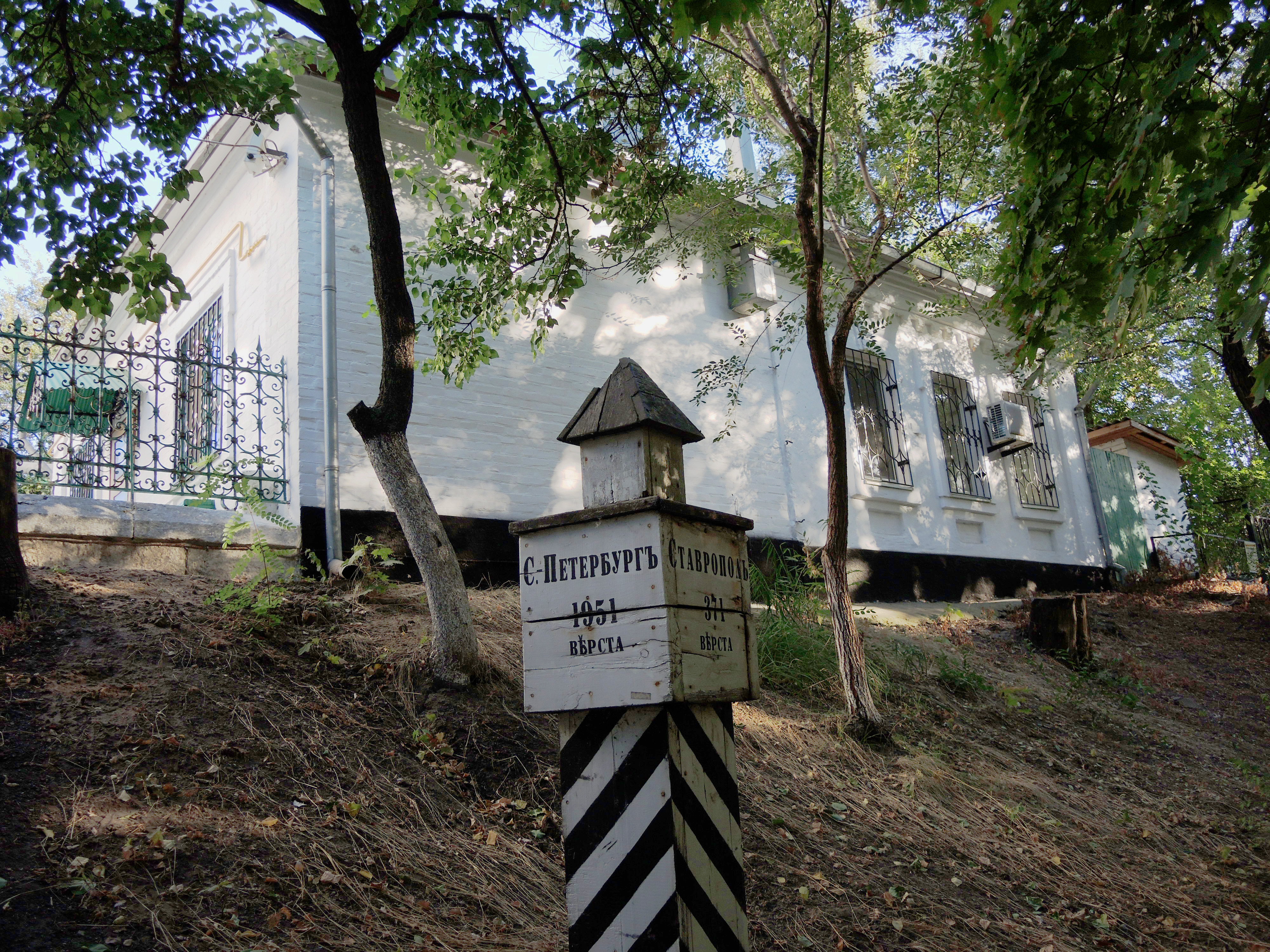 Почтовая станция: спуск Будённовский, 3, Аксай, Аксайский район, Ростовская область